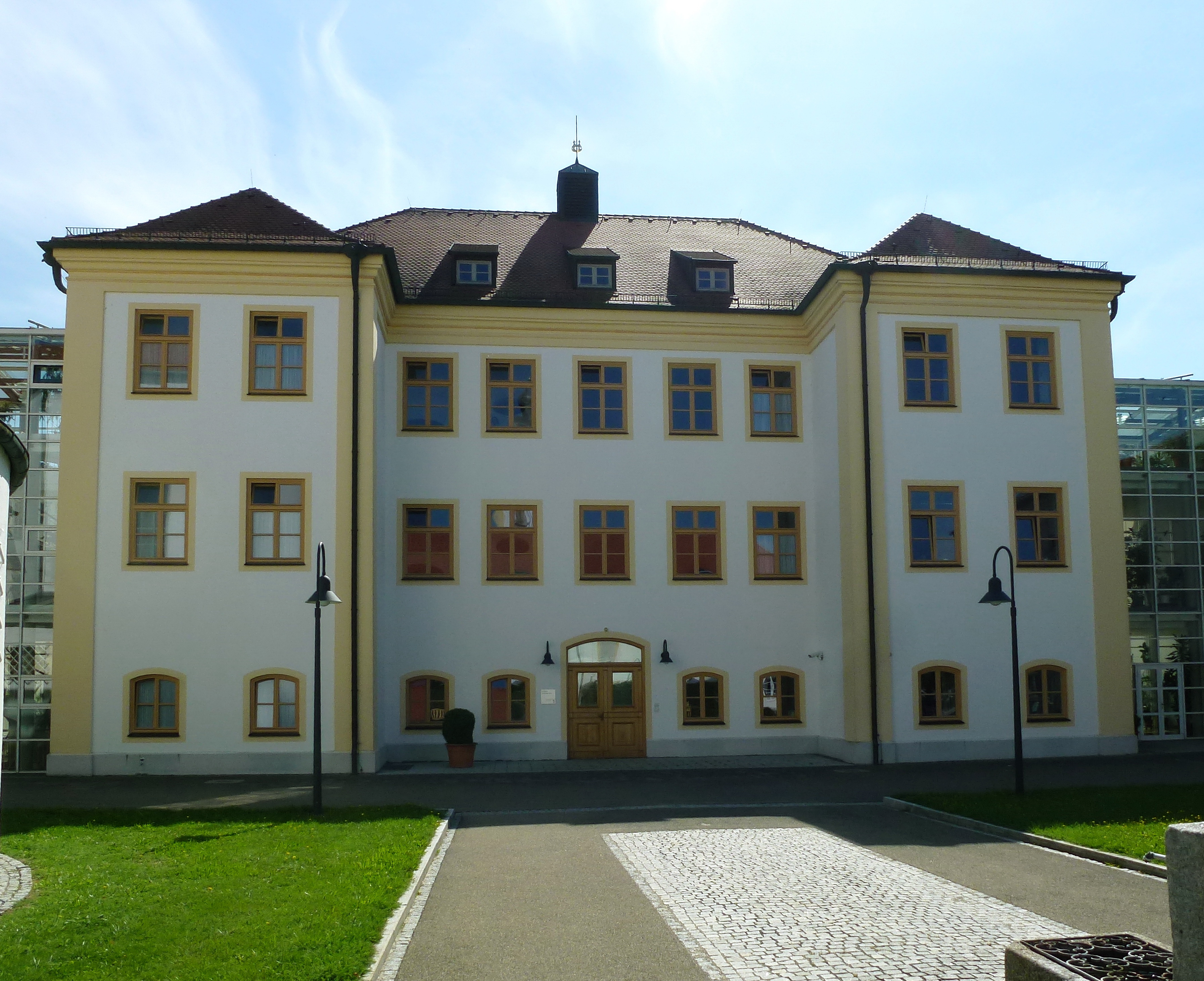 Schönbrunn, Prälat-Steininger-Str.1: Ehemaliges Schloß (erbaut 1688), heute Krankenanstalt. Ansicht von N (die Objekt-Anzeige in GeoHack ist nicht zutreffend!)